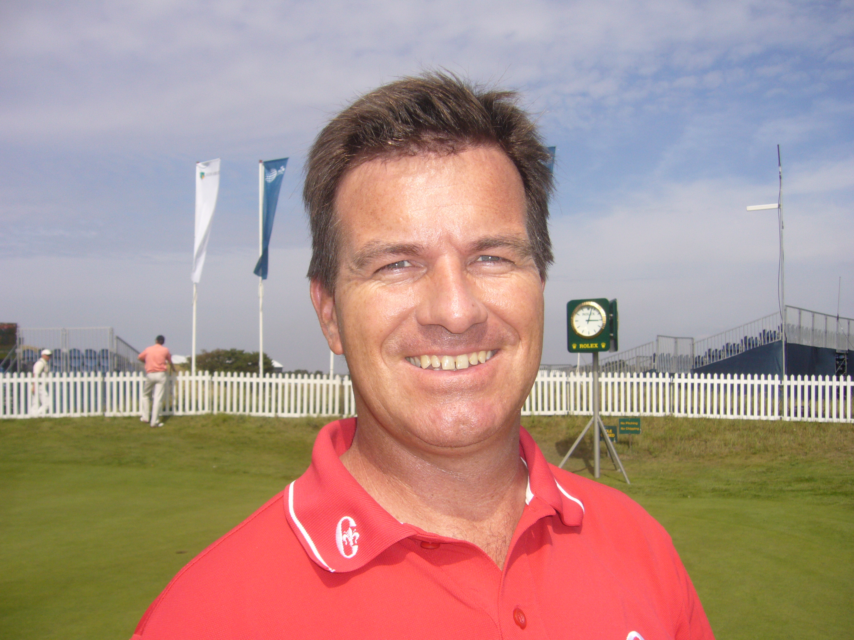 Miles Tunnicliff op het KLM Open 2009 op de Kennemer Golf & Country Club|Kennemer Golf & Country Club